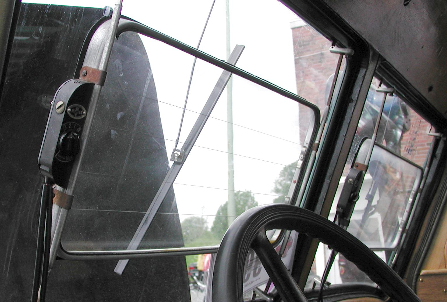 Opel-Blitz LF15 dreistufige Scheibenheizung des Opel Blitz LF15 (Feuerlöschpolizei), innen